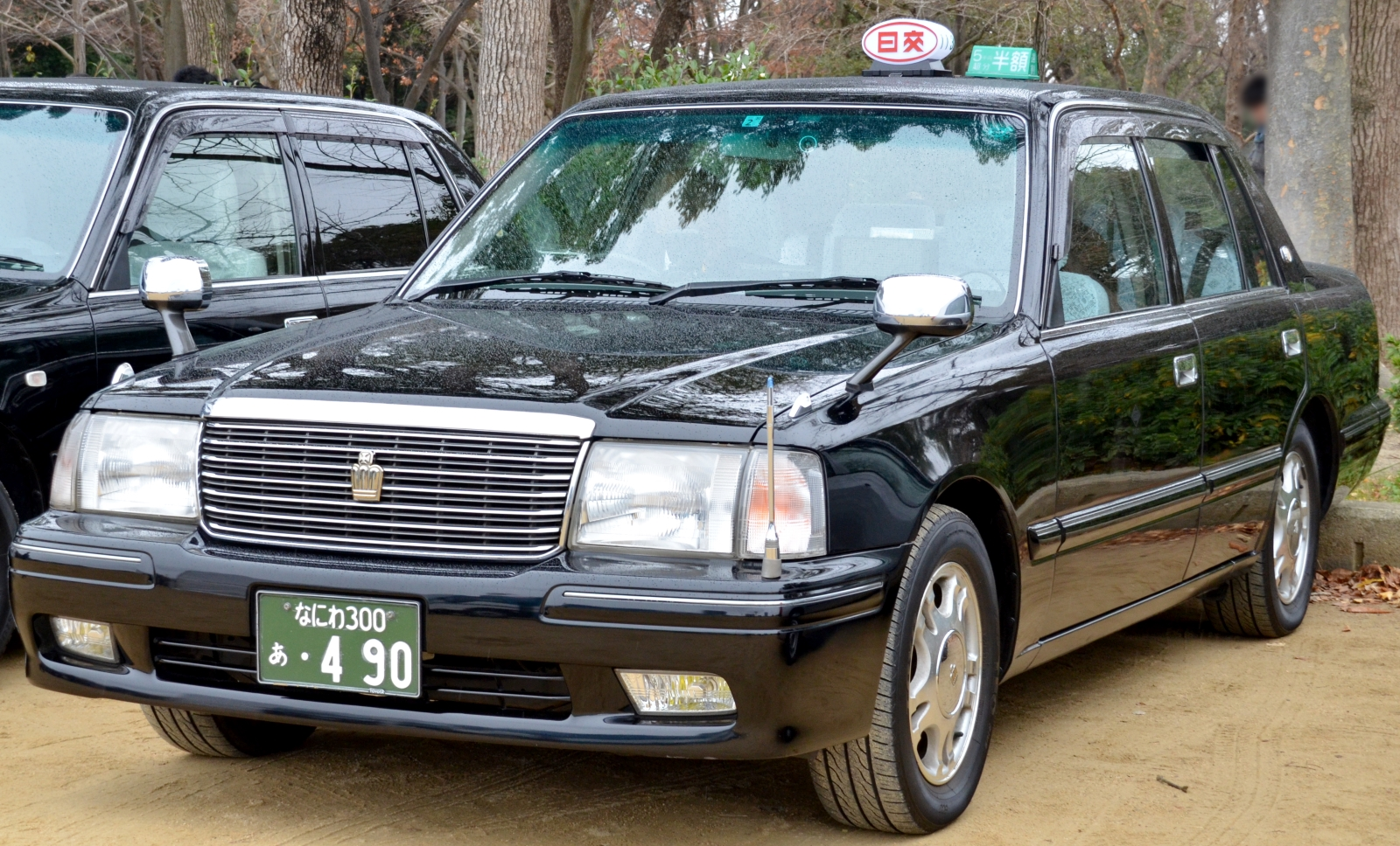 日本交通（大阪）のタクシー